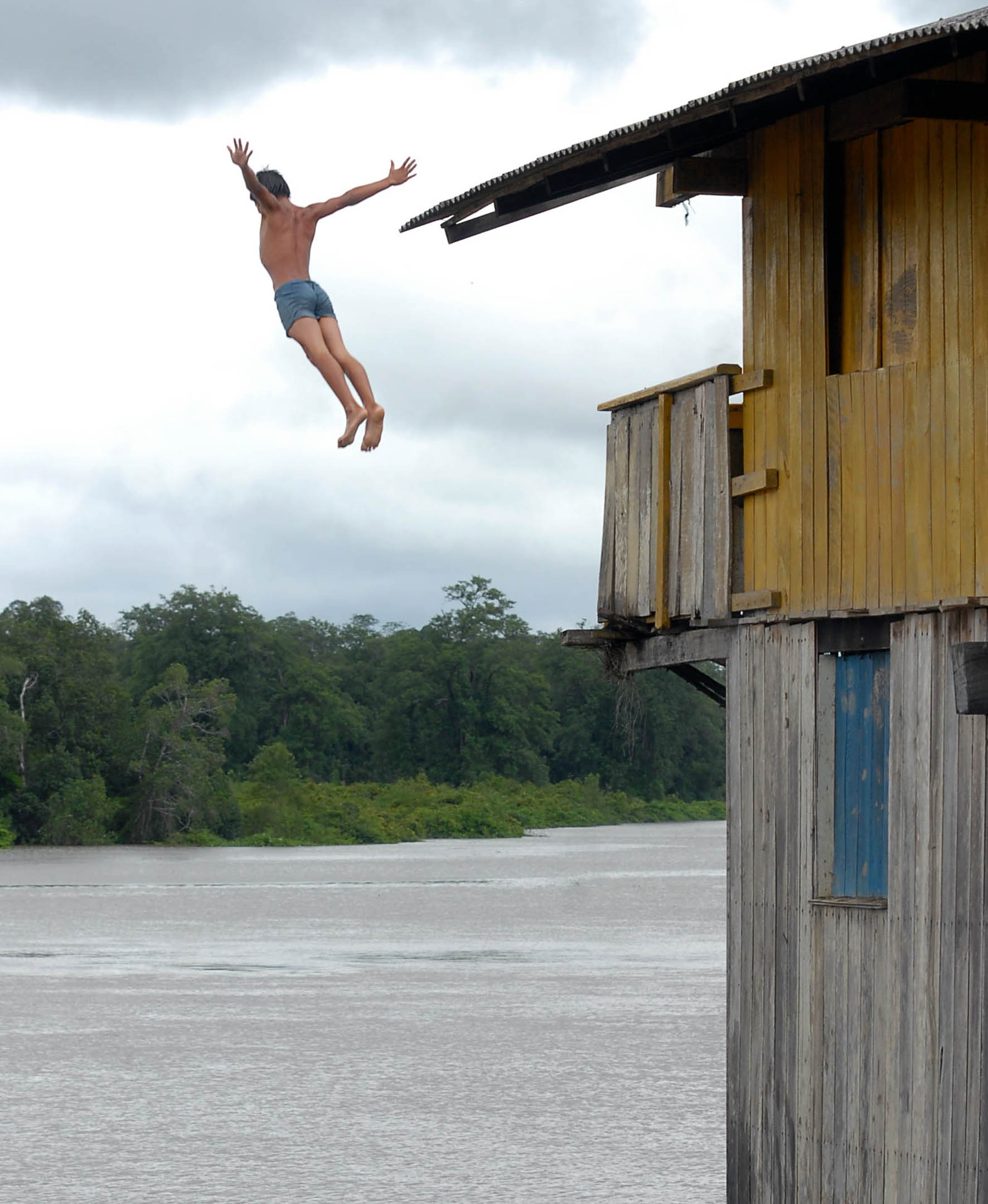 Nova Santarém (PA) - Meninos brincam às margens do Rio Maracanã.